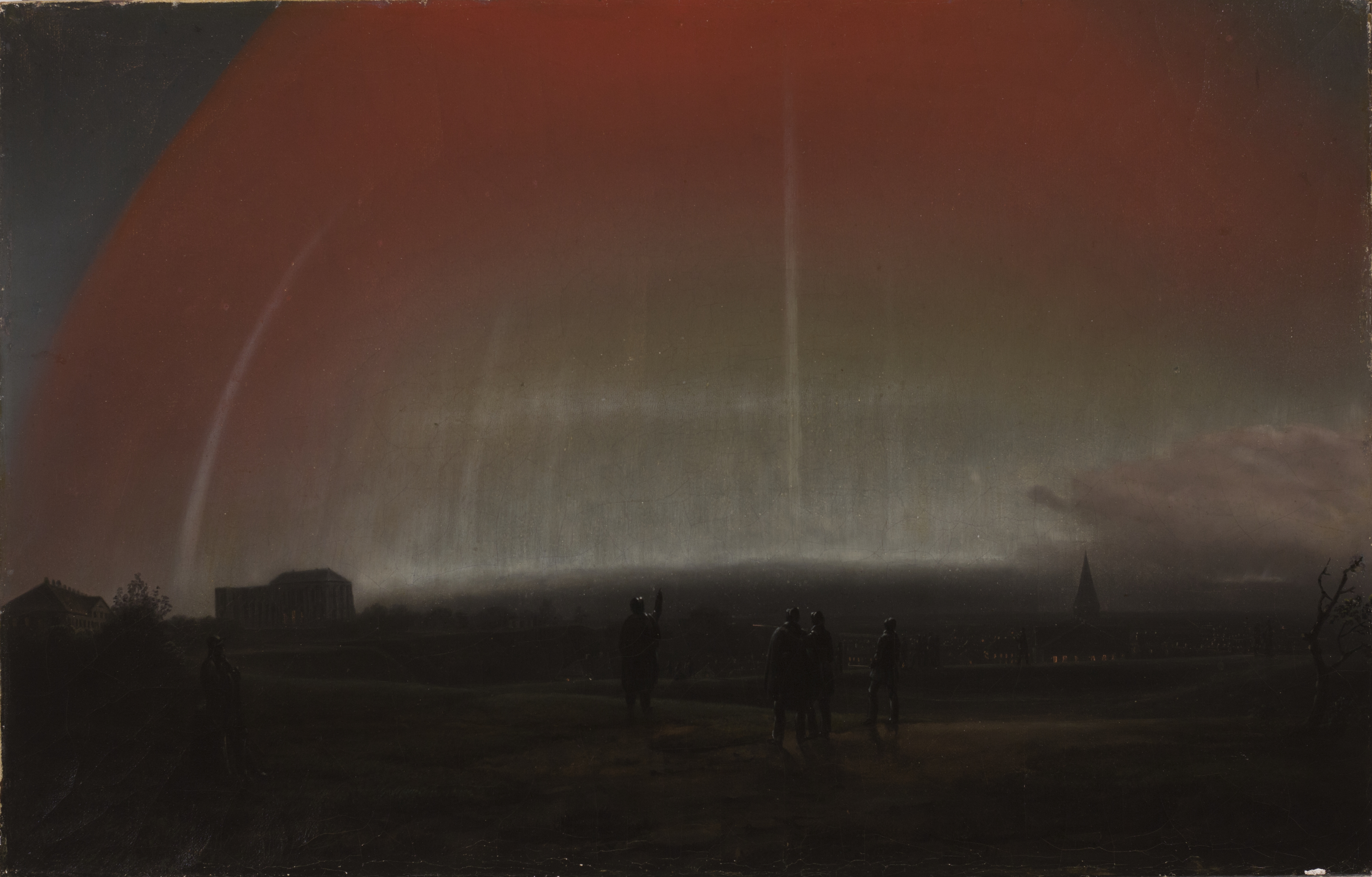 "Virmalised". 1836. Õli lõuendil. 37,5 x 58,5 cm. MUIS: TKM TR 4279 M 715 This image on crowdsourcing geotagging platform Ajapaik